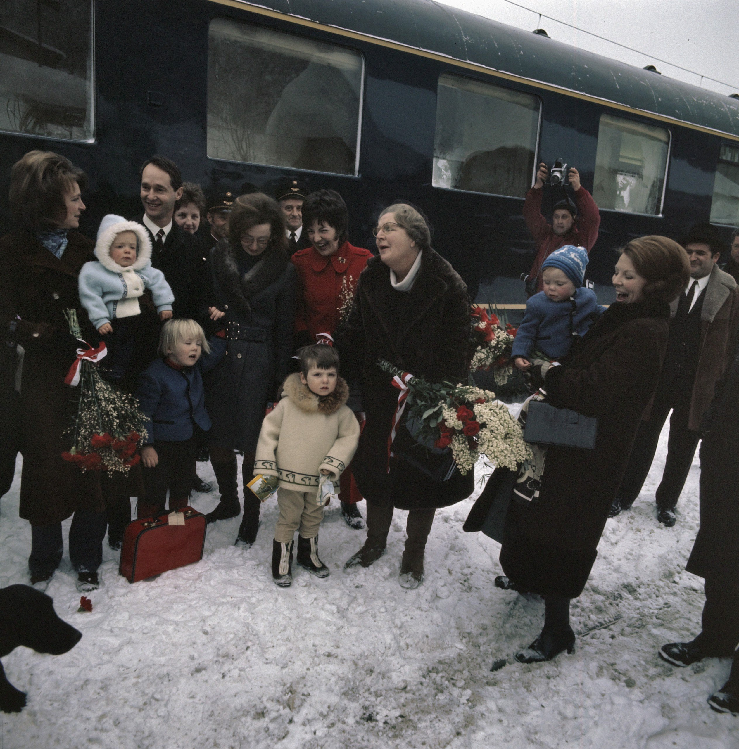 Collectie / Archief : Fotocollectie Anefo Reportage / Serie : [ onbekend ] Beschrijving : Aankomst Koninklijke Familie in Lech met trein; Prinses Irene met Prins Carlos Jr. en Prins Carlos Datum : 2 maart 1971 Locatie : Lech Trefwoorden : AANKOMSTEN, Koninklijke familie, treinen, vakanties Persoonsnaam : Carlos, prins, Carlos, prins, Irene, prinses Fotograaf : Evers, Joost / Anefo Auteursrechthebbende : Nationaal Archief Materiaalsoort : Dia (kleur) Nummer archiefinventaris : bekijk toegang 2.24.01.07 Bestanddeelnummer : 254-8821